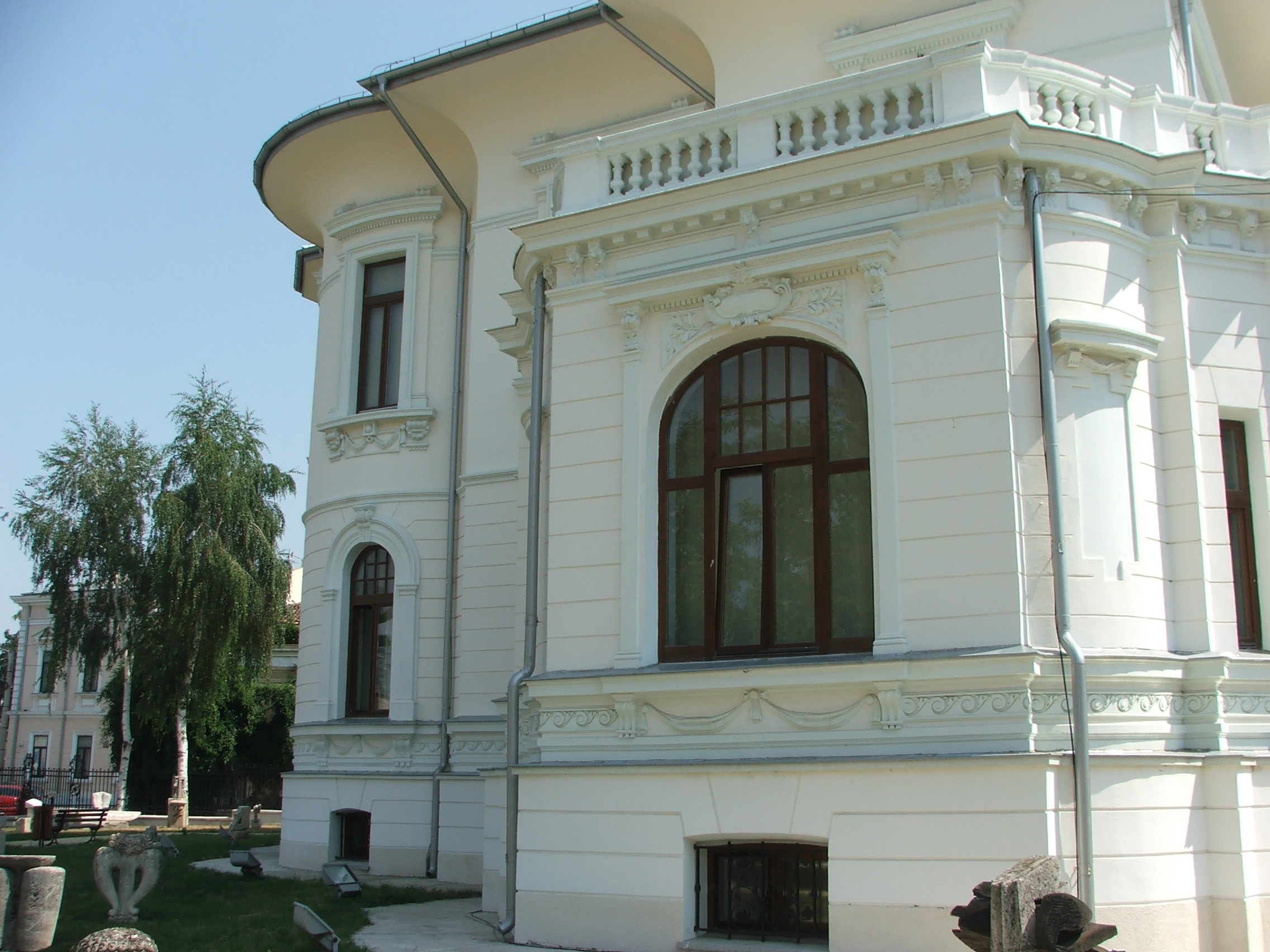 Casa Embericos, azi Centrul Cultural "Nică Petre"